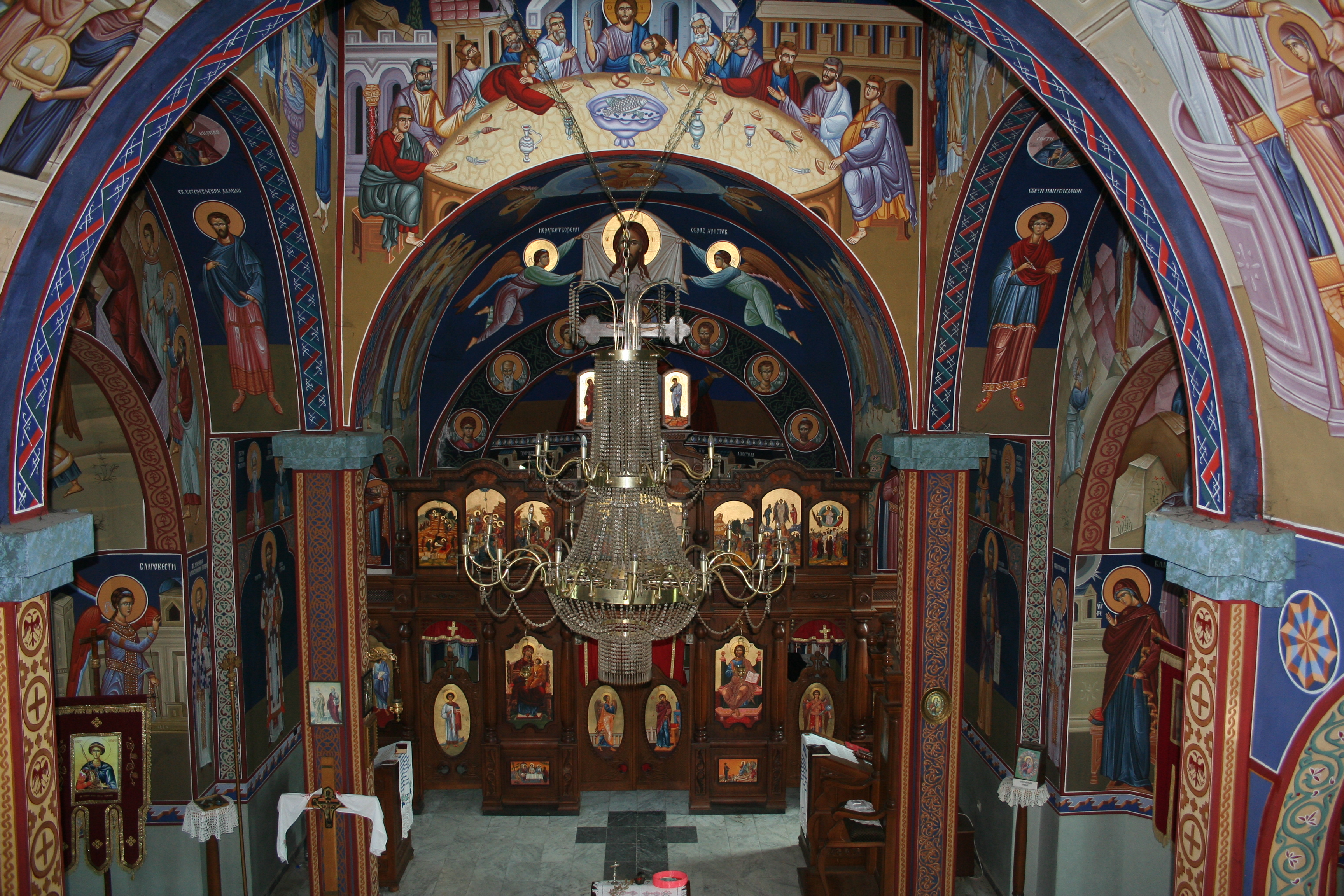 Crkva Sv. Petra i Pavla, Noćaj